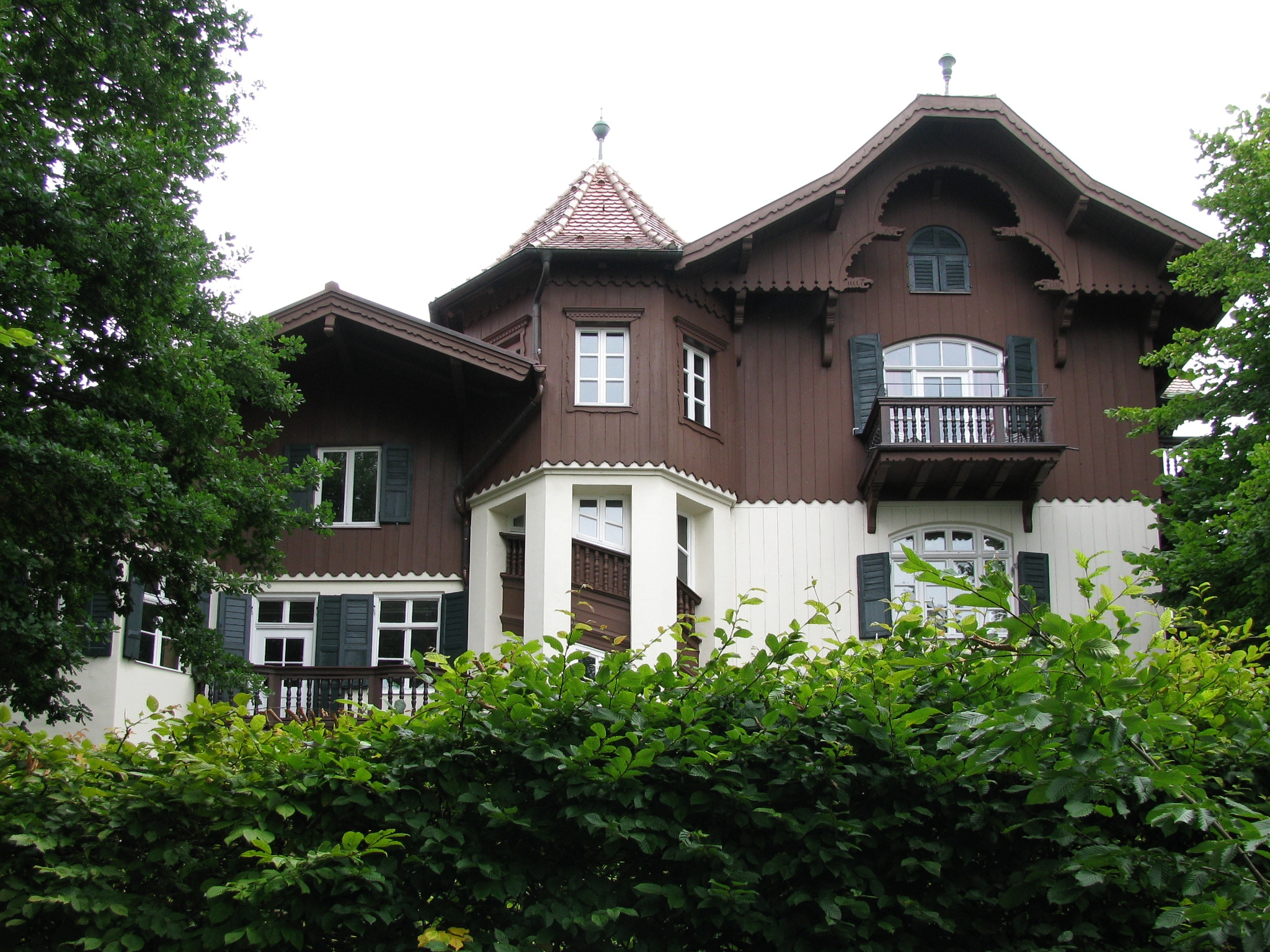 Ammerland, Südliche Seestraße 31; Stattliches Landhaus mit hölzernem zweitem 0bergeschoss, zum Teil Fachwerk, Treppenturm und geschwungener Giebelschalung. Umgebaut 1889 von Emanuel von Seidl. Zugehörig reizvoller Pavillon mit dreiseitigem Umgang, Laterne und Belvedere, von Emanuel von Seidl um 1910.